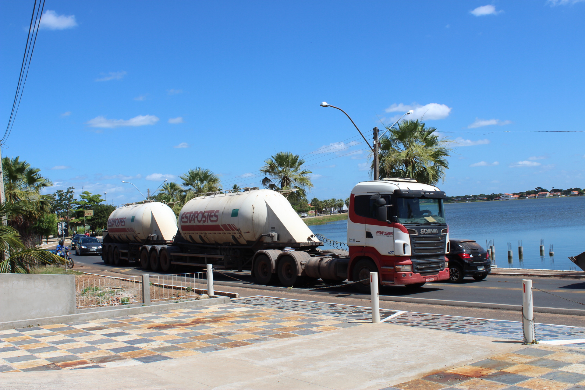 Caminhão da Scania numa rodovia no Brasil